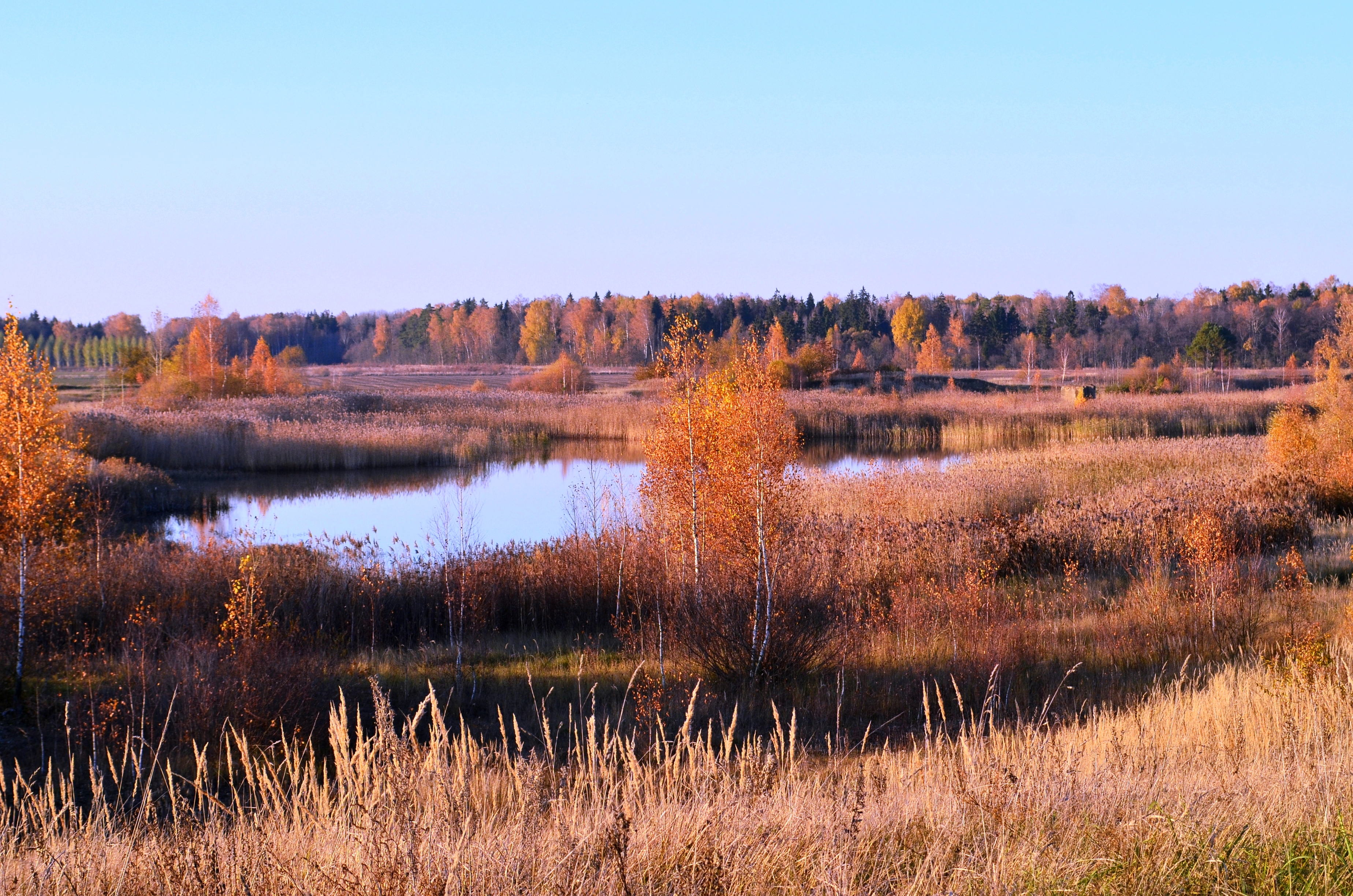 Milžemių karjeras, Kėdainių raj.